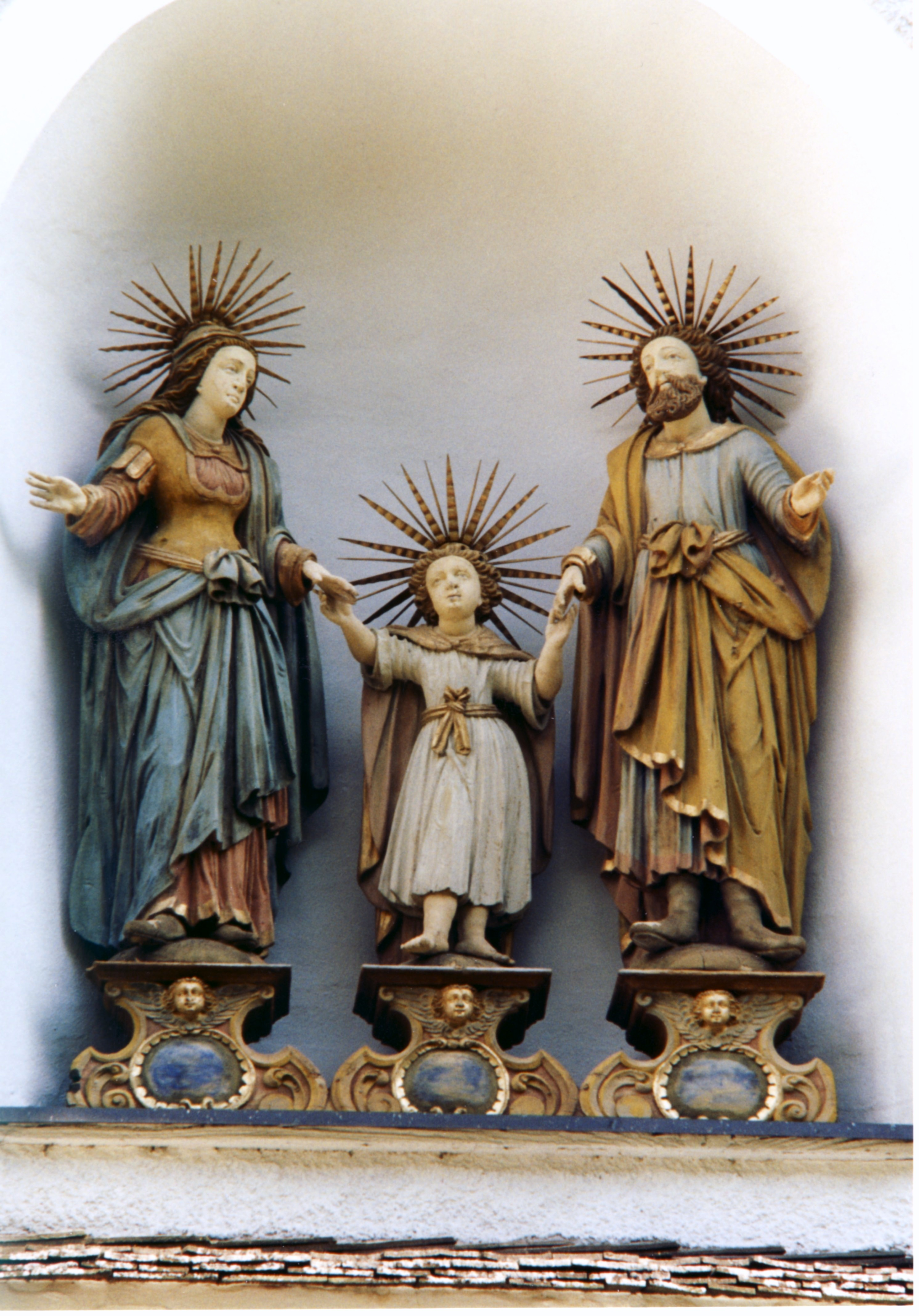 Der "Heilige Wandel" von Joseph Witwer in einer Fassadennische der Pfarrkirche Biberwier (Tirol)